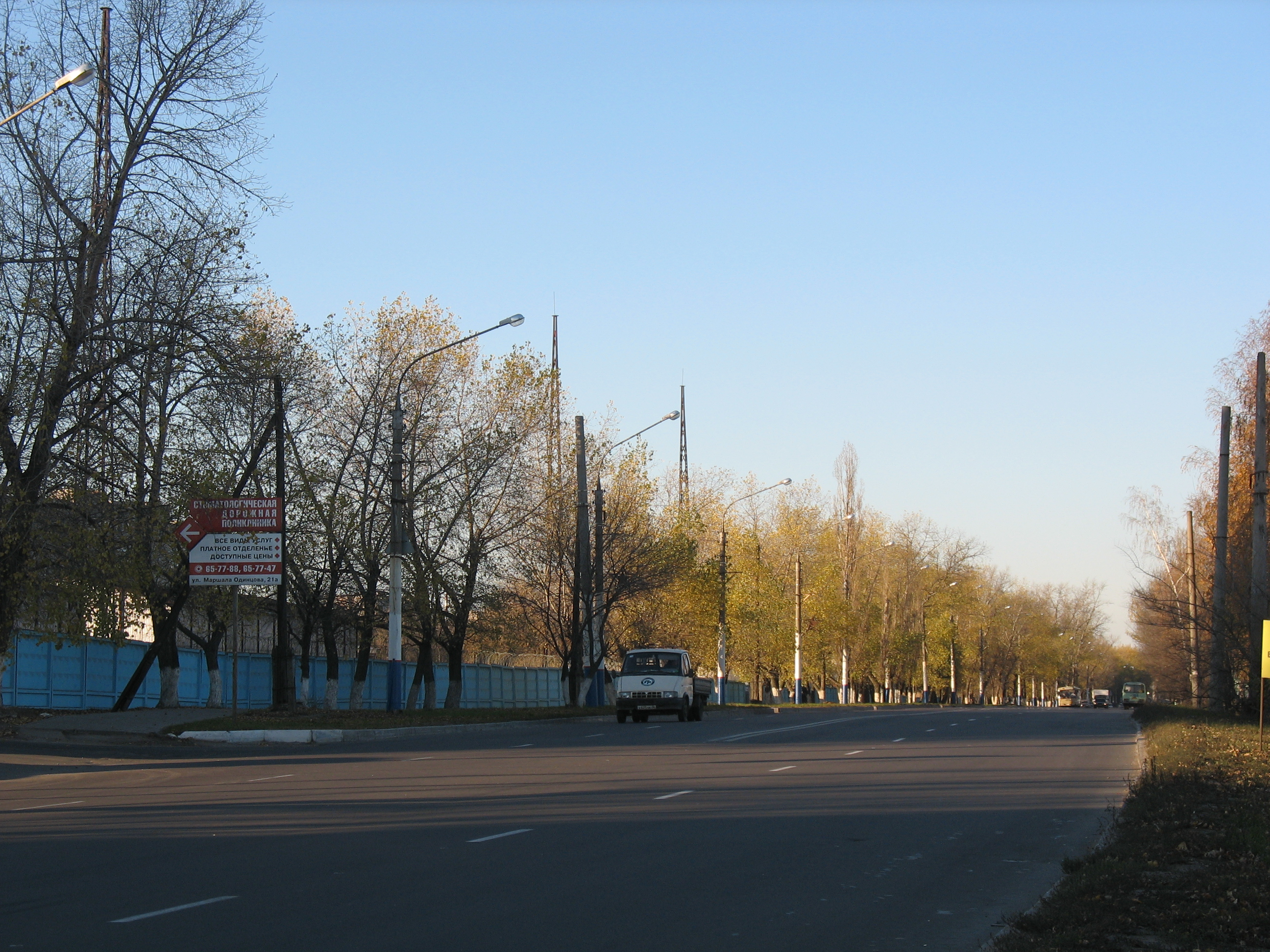 Улица Богдана Хмельницкого (Воронеж)